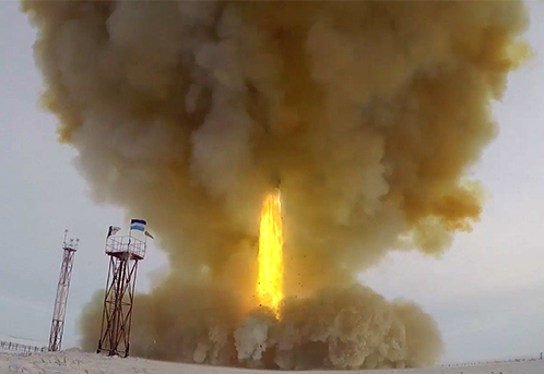 Пуск ракеты комплекса «Авангард» из позиционного района Домбаровский